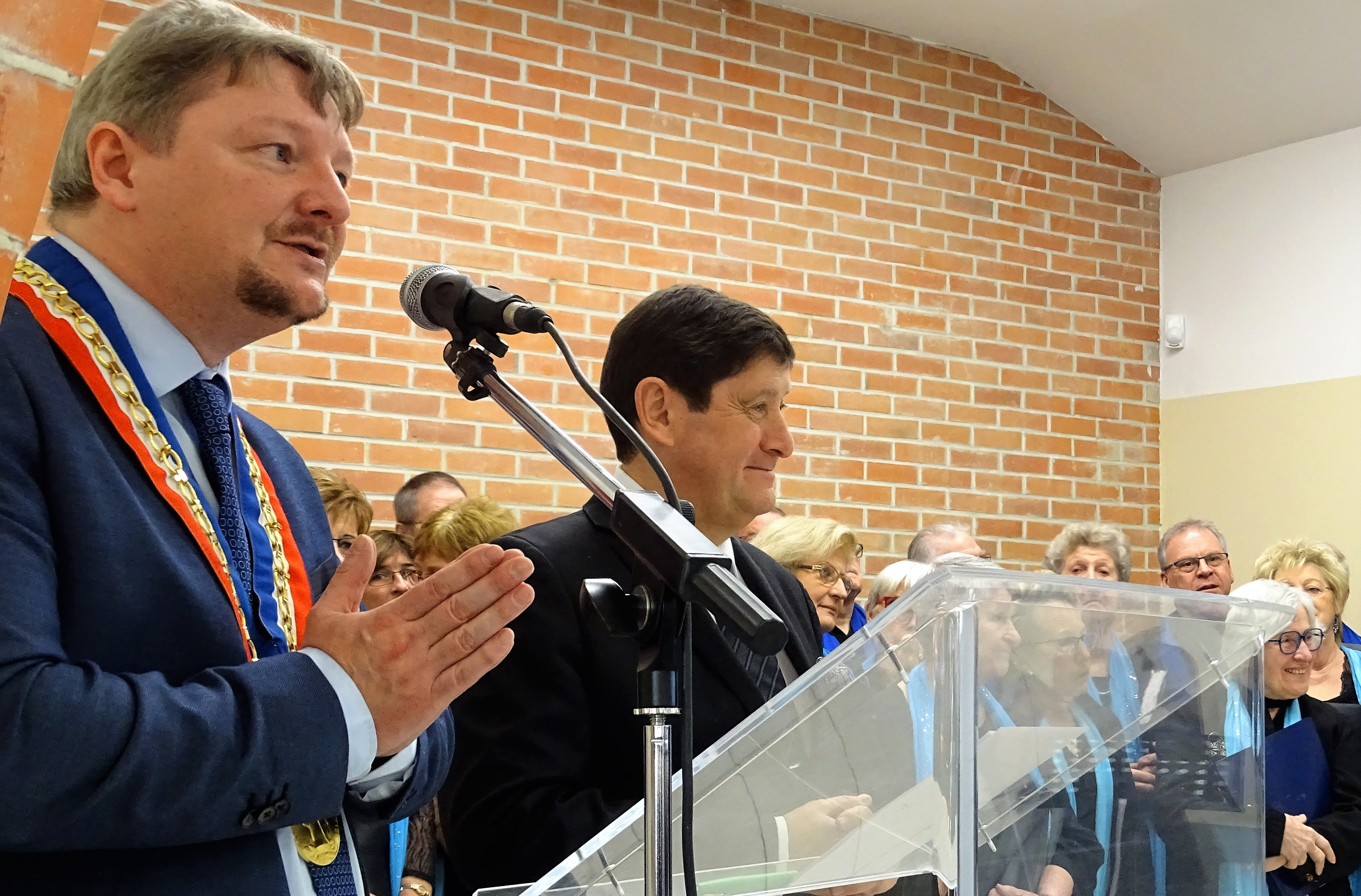 Frédéric Delannoy, maire en présence de Patrick Kanner lors de l'inauguration de la chapelle Heurteau le 21 janvier 2017